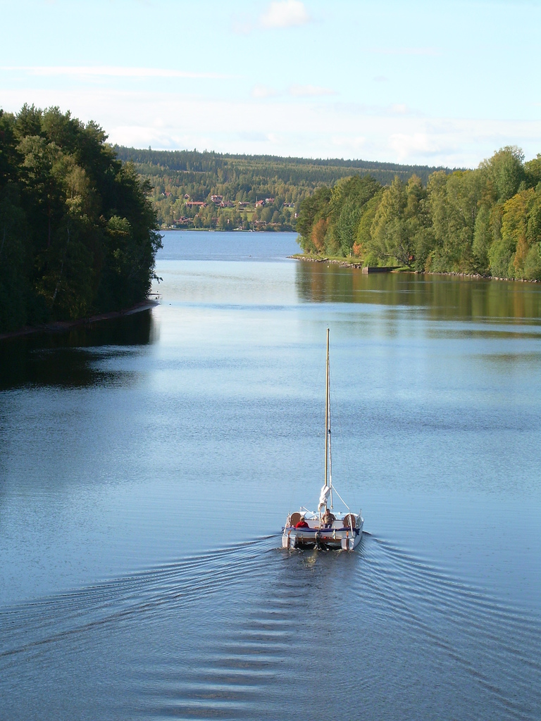 Leksand, Österdalälven mot Siljan, båt